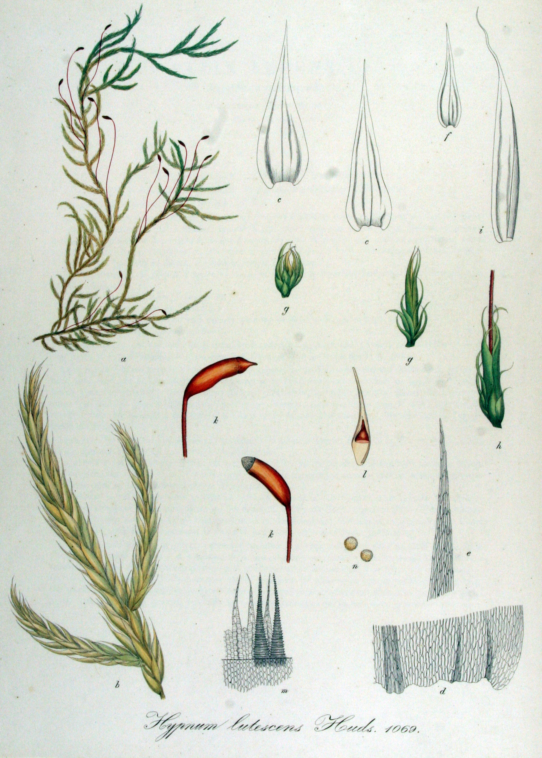 Camptothecium lutescens (Hedw.) Schimp., syn. Hypnum lutescens Hedw.